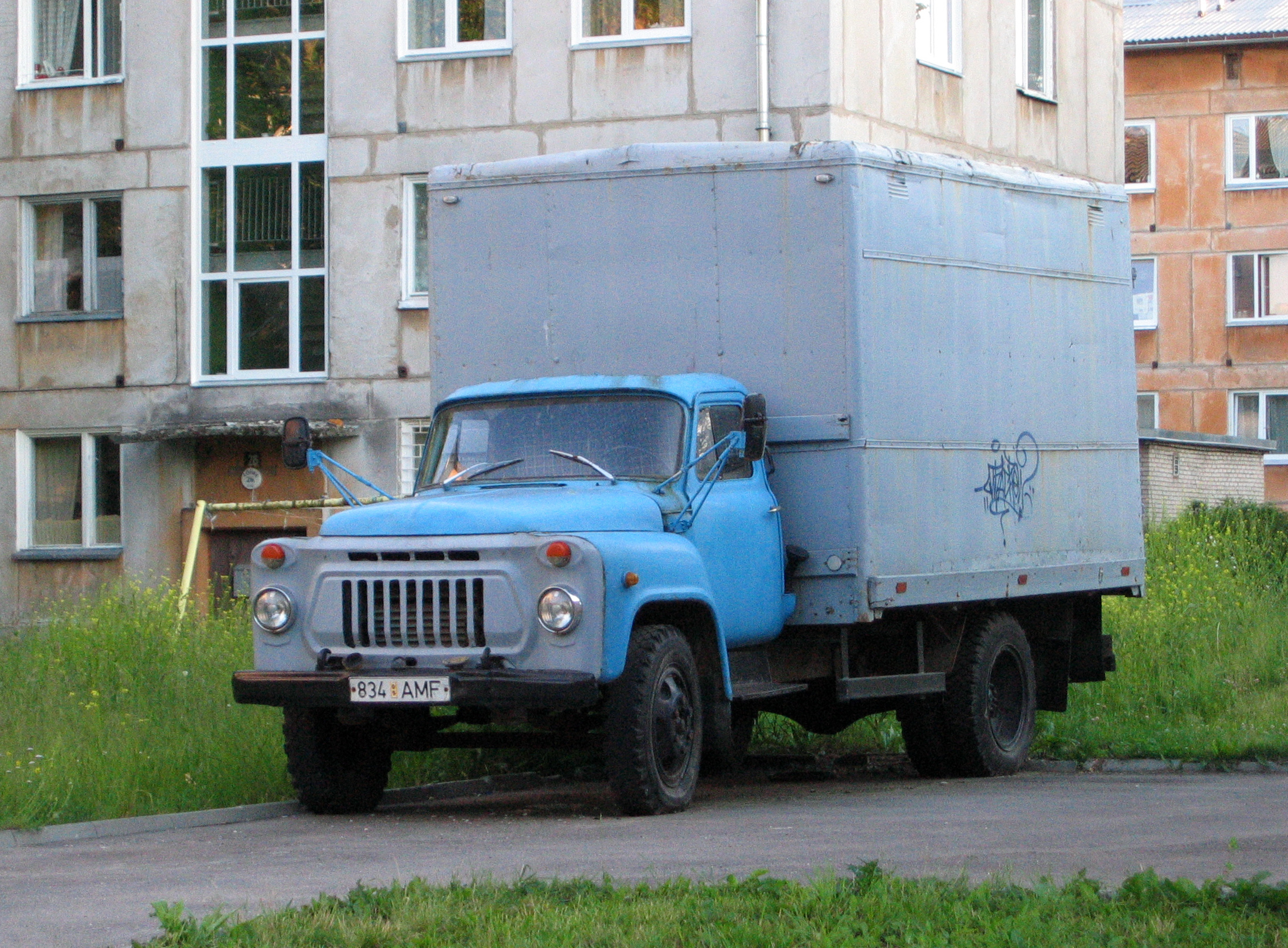 Tallinn Sommer 2007